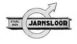 Julius Slöör "Järnslöör Etabl. 1858"